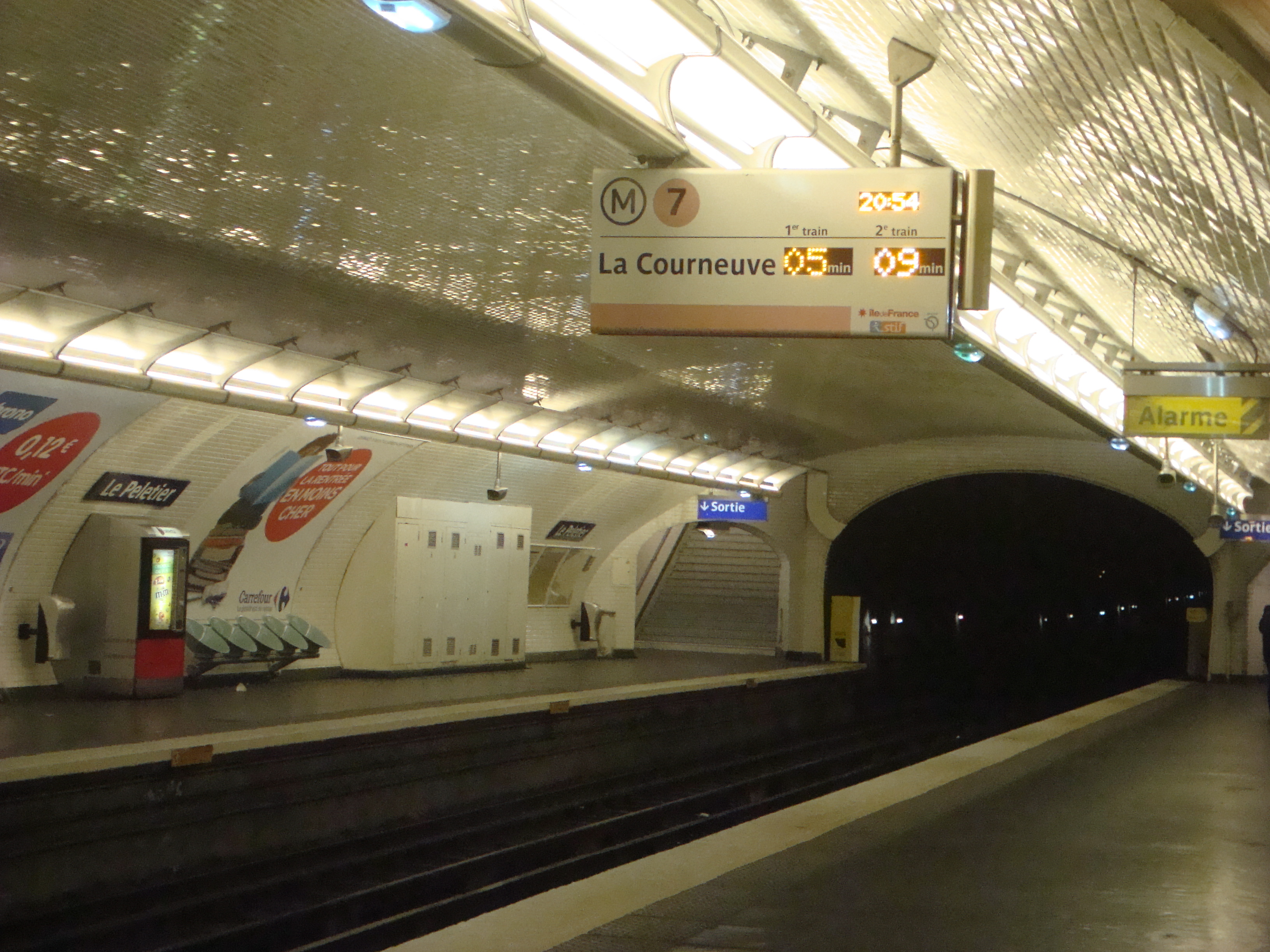 Quais de la station Le Peletier sur la ligne 7 du métro de Paris